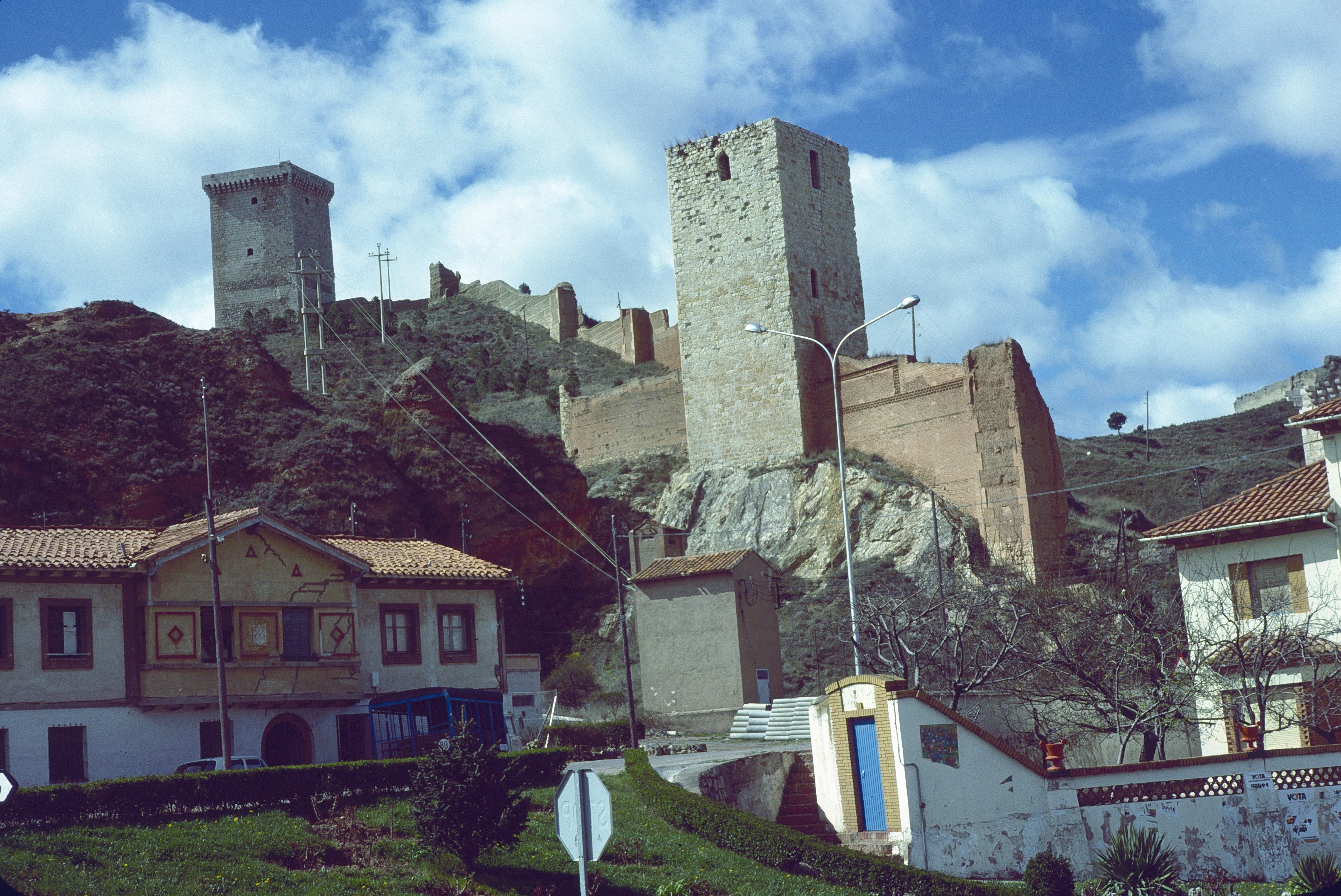 Daroca, Mauern